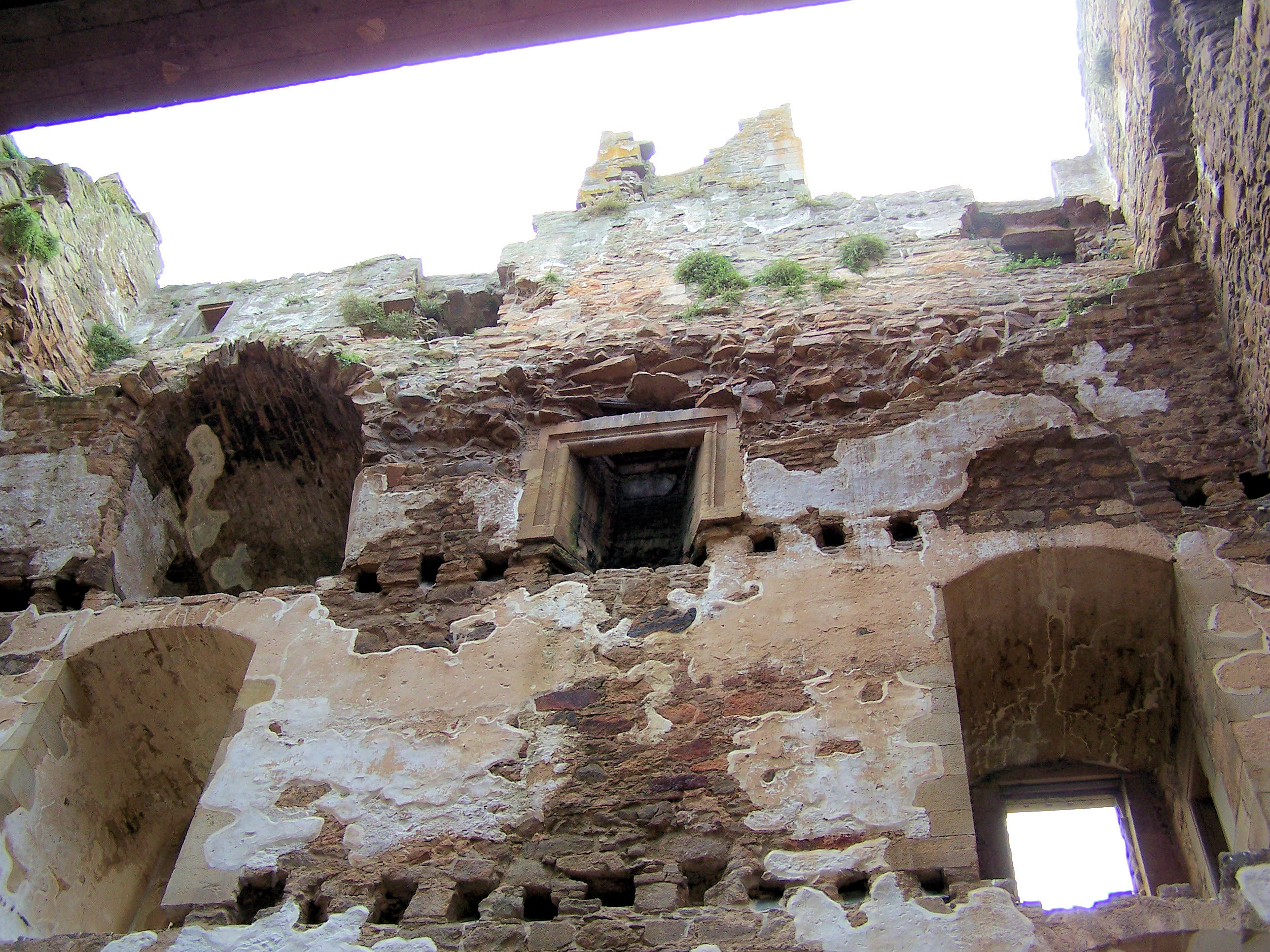 Spynie Palace